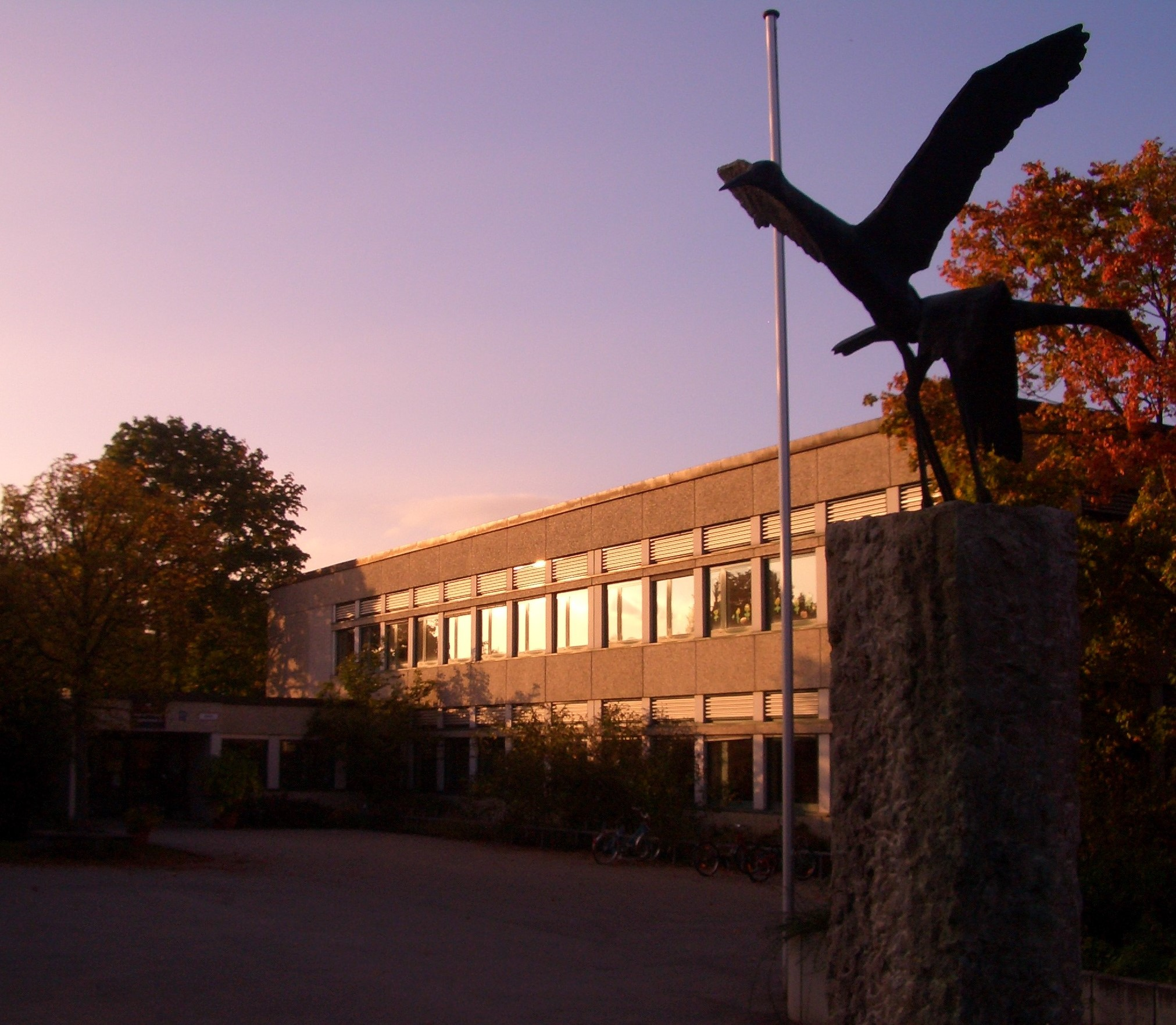 Knappertsbuschschule im Fideliopark München